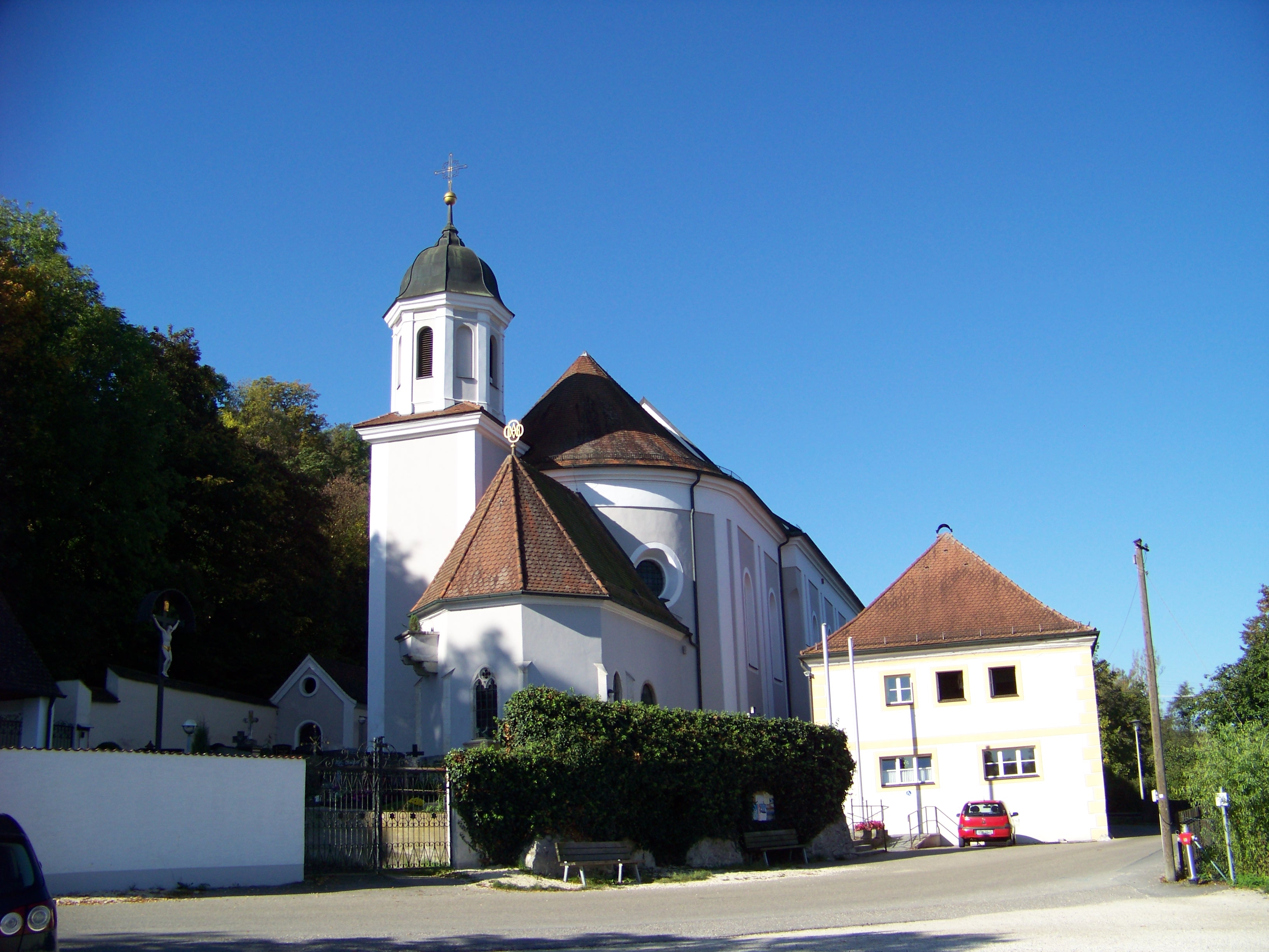 Sinzing, Mariaort 3, Wallfahrtskirche Mariä Himmelfahrt. Saalbau mit eingezogenem Chor, Flankenturm mit Welscher Haube und Rahmengliederungen, frühklassizistisch, 1774-76 unter Verwendung des ehem. Chores, jetzt Sakristei, Mitte 15. Jahrhundert, und des mittelalterlichen Turmes; mit Ausstattung; Friedhofsmauer, 17./18. Jahrhundert; Seelenkapelle, kleiner Satteldachbau, wohl um 1860.